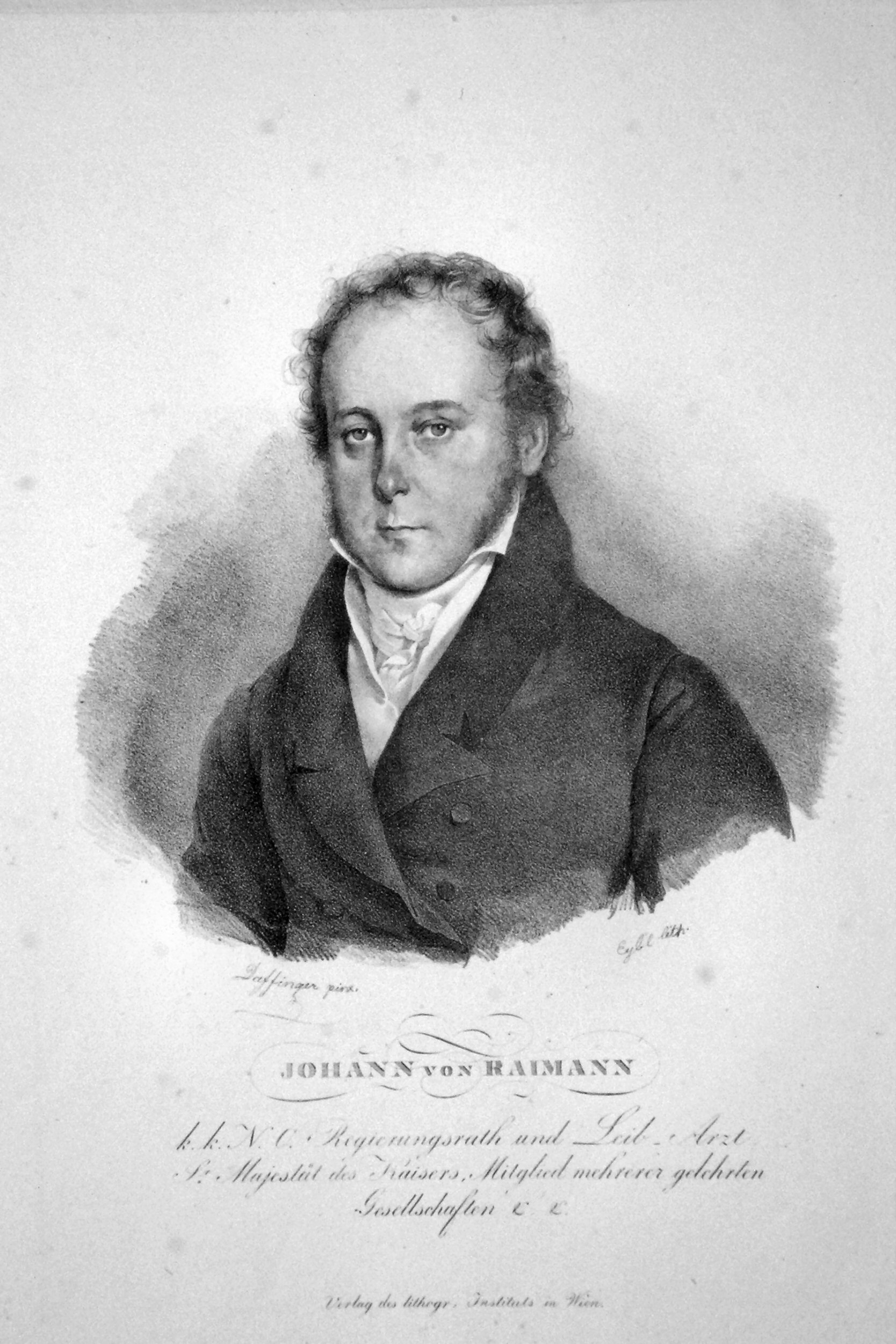 Johann Nepomuk von Raimann (1780-1847), österreichischer Mediziner, Leibarzt des Kaisers Ferdinand I. Lithographie von Franz Eybl,s. a., nach Moritz Daffinger